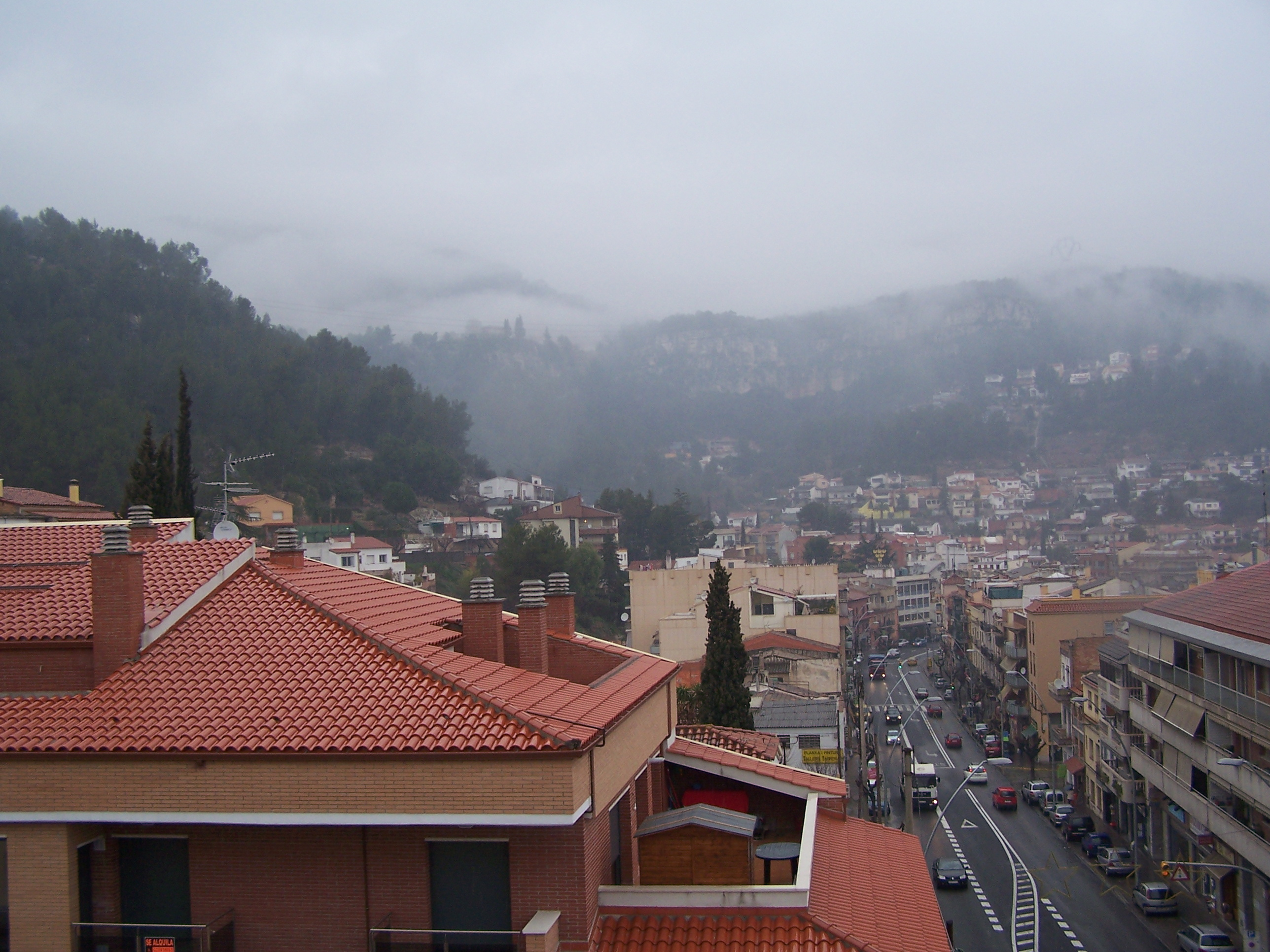 Boira a Vallirana